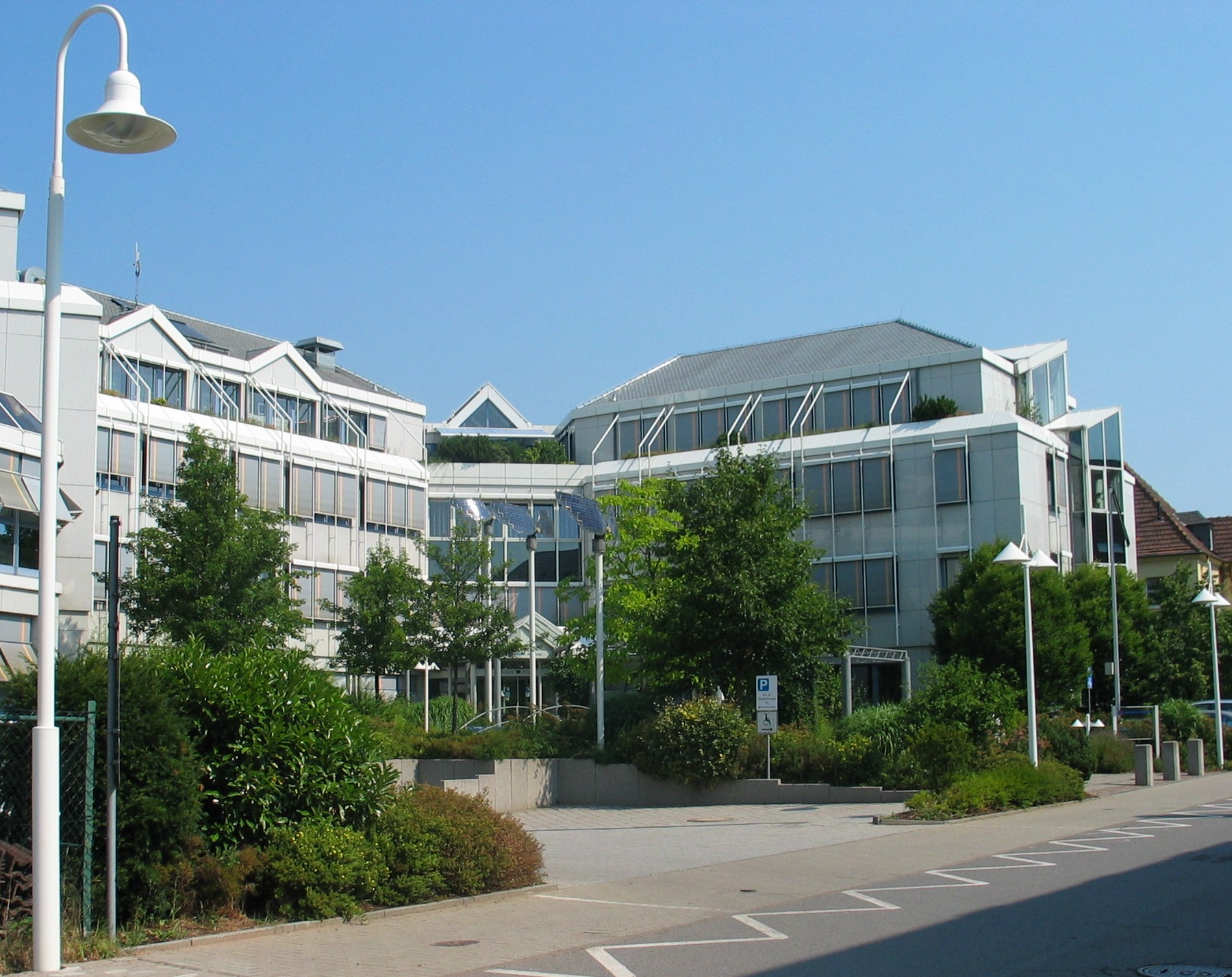 Deitsch: Gebäude der Stadtwerke Homburg